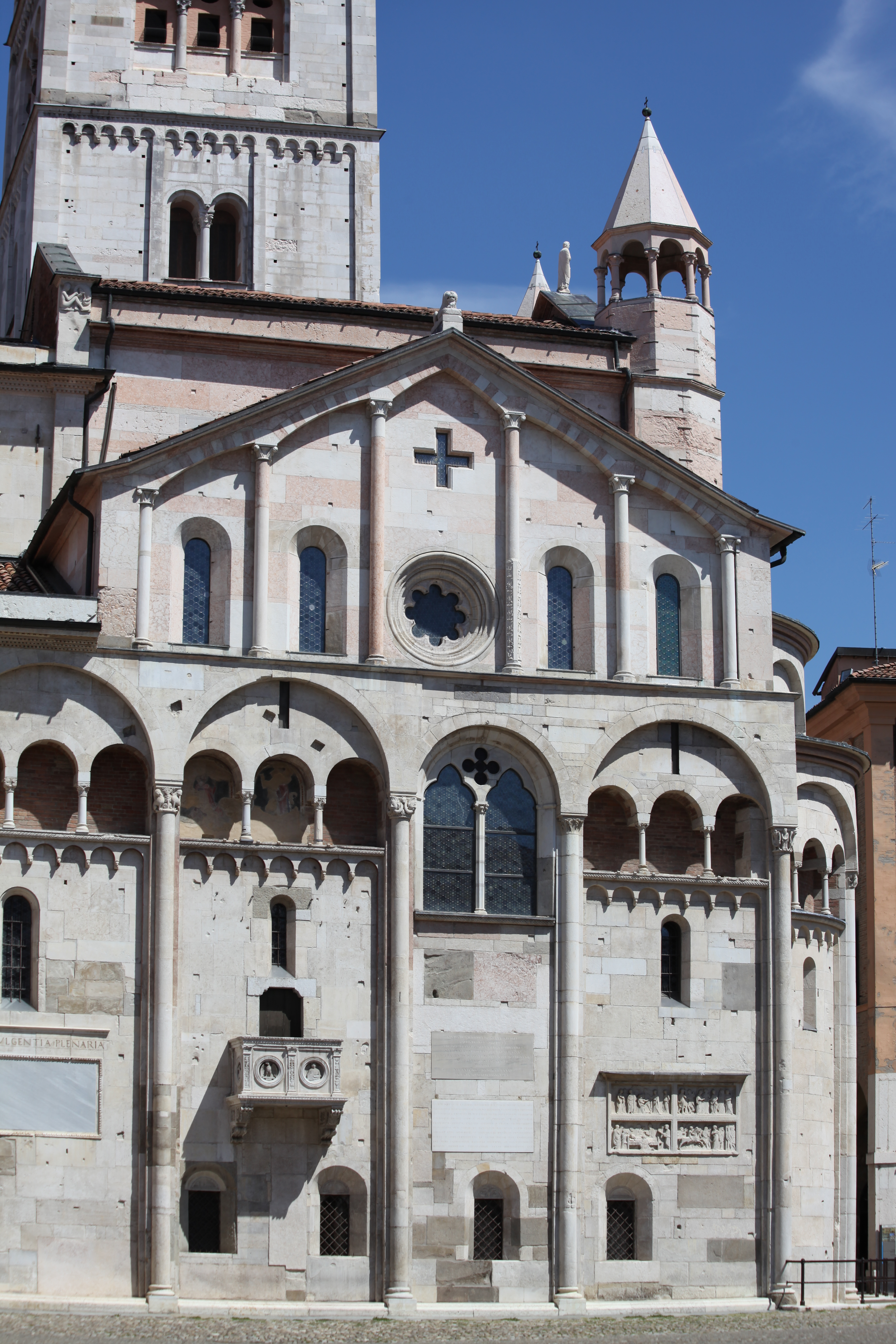 Duomo (solo esterni) This is a photo of a monument which is part of cultural heritage of Italy.